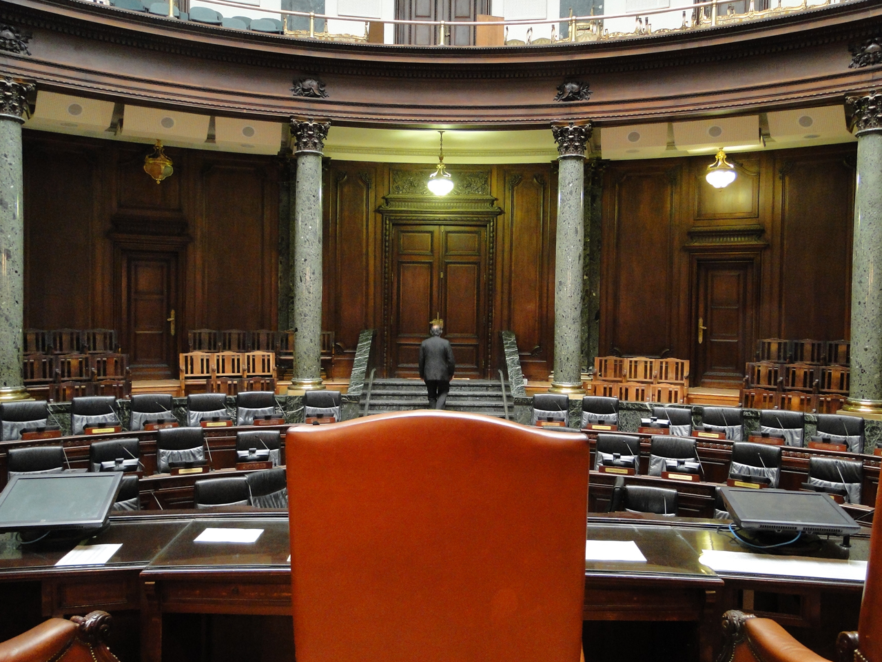 Recinto de sesiones de la Legislatura Porteña